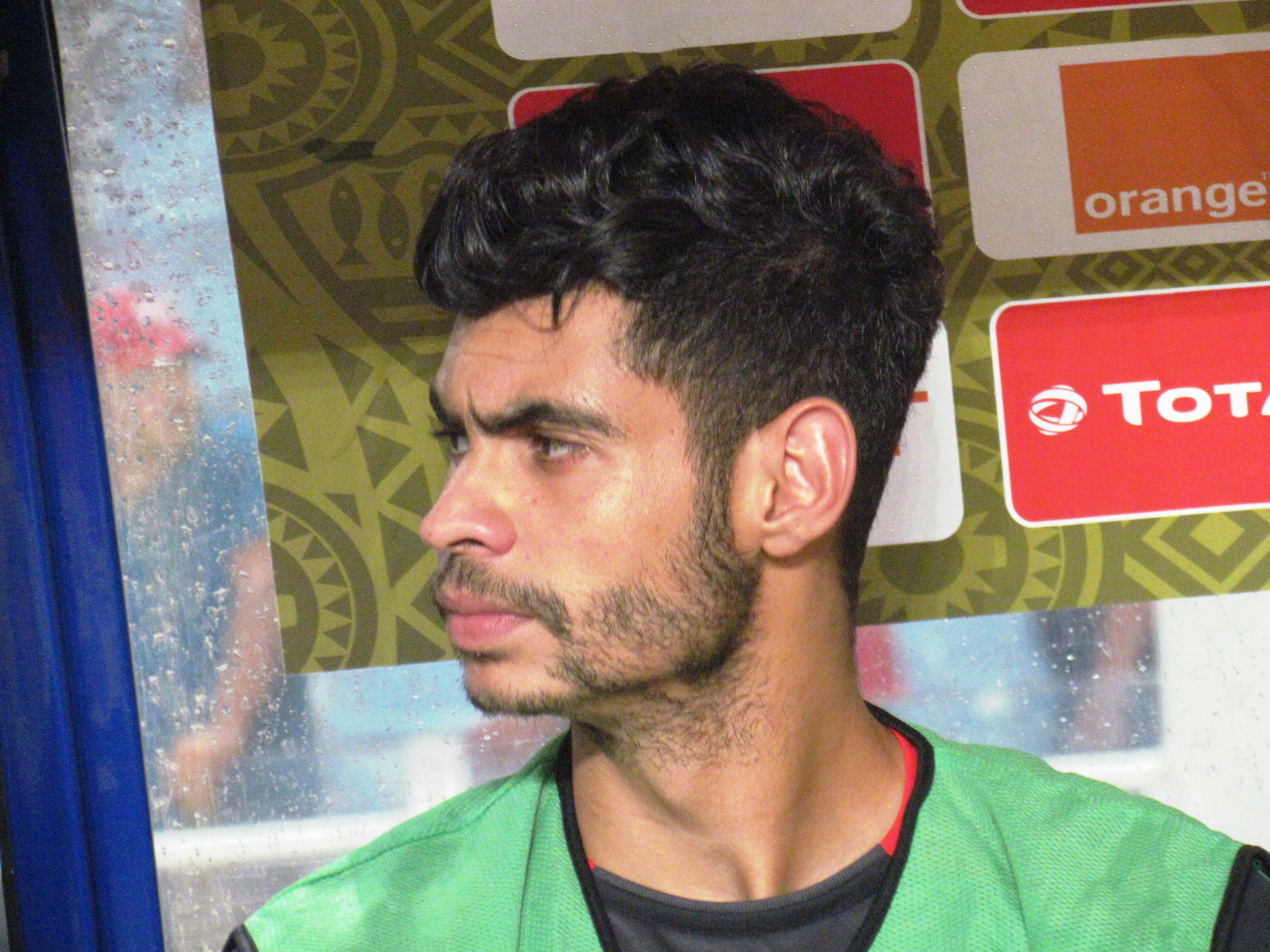 Portrait de Chamseddine Dhaouadi lors de la rencontre entre l'Espérance sportive de Tunis et Al Ahly SC en Ligue des champions de la CAF 2018